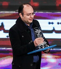 اهداء سیمرغ بلورین بهترین موسیقی متن سی‌وهفتمین جشنواره فیلم فجر به امین هنرمند برای فیلم «قصر شیرین» دوشنبه ۲۲ بهمن ۱۳۹۷ سالن همایش‌های برج میلاد تهران